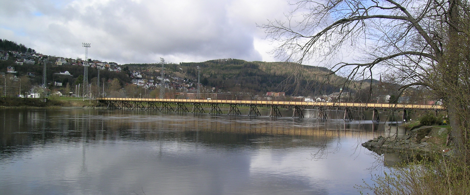 Gangbrua mellom Øya og Kalvskinnet, Trondheim. Originalen bygd 1902; gjenoppbygd 1995.